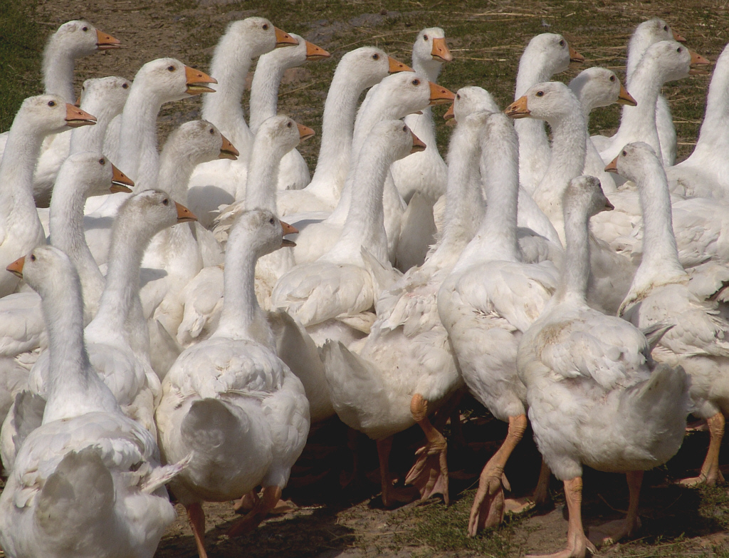 Junge Hausgänse in Freilandhaltung (2005)